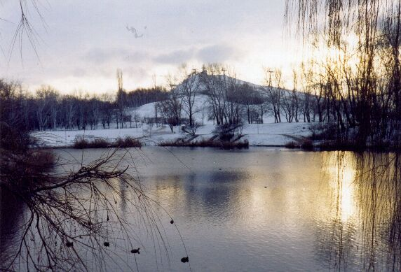 Park Szczęśliwicki wczesną zimą - Górka Szczęśliwicka i Glinianka Szczęśliwicka